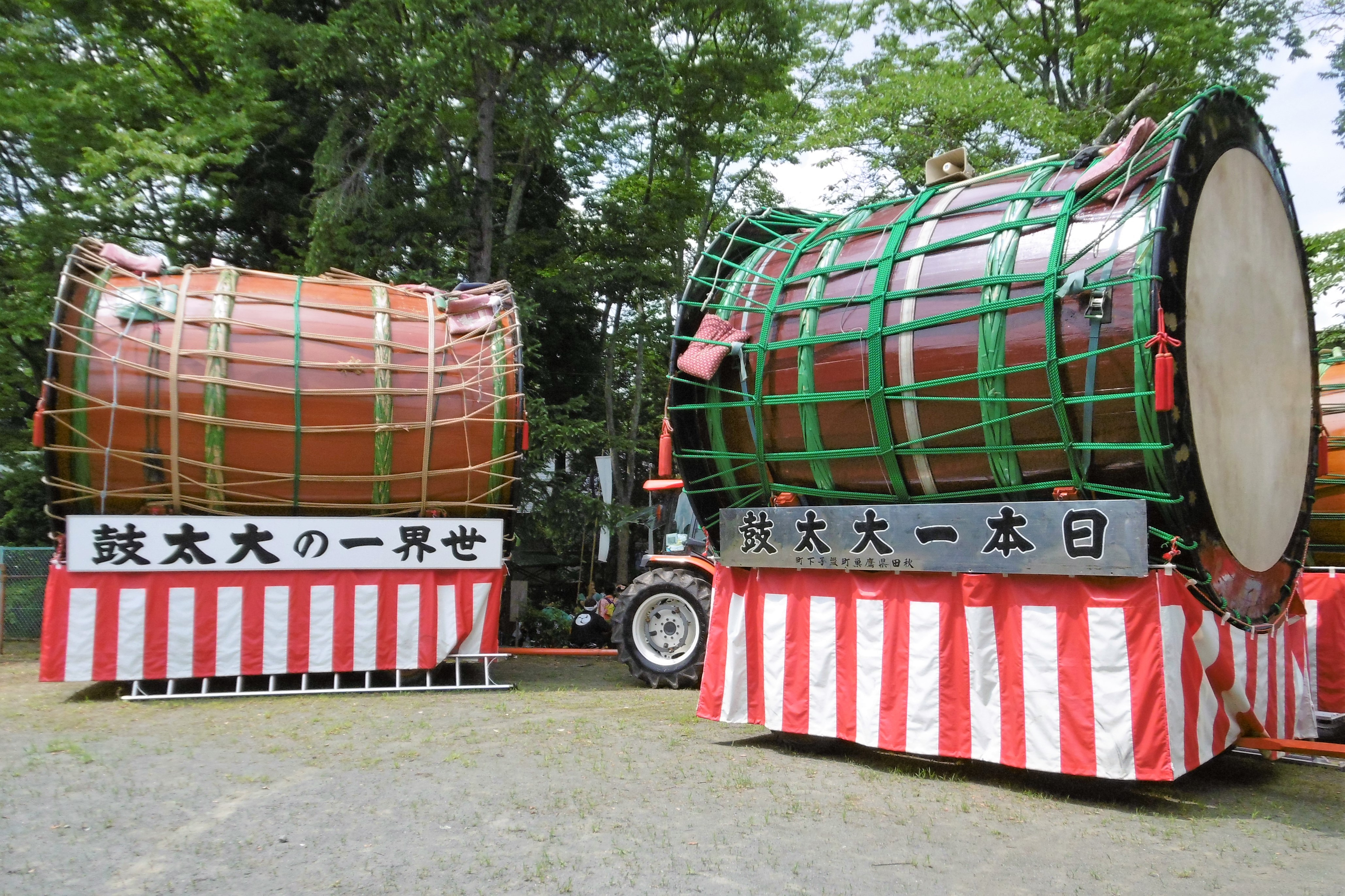 綴子大太鼓：秋田県北秋田市綴子